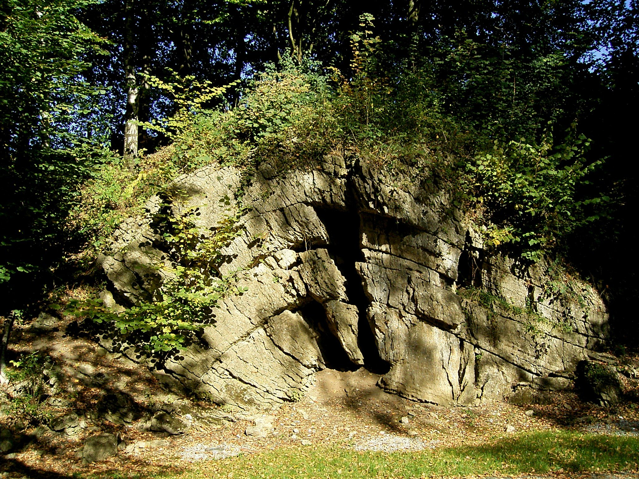 Tillmannsdorfer Sattel in Wülfrath